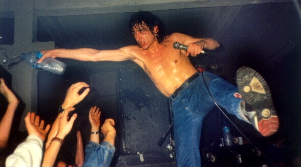 Evaristo Páramos, La Polla Records